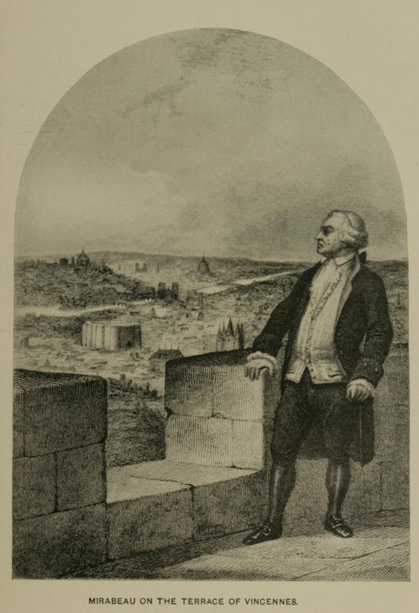 Mirabeau sur la terrasse du château de Vincennes